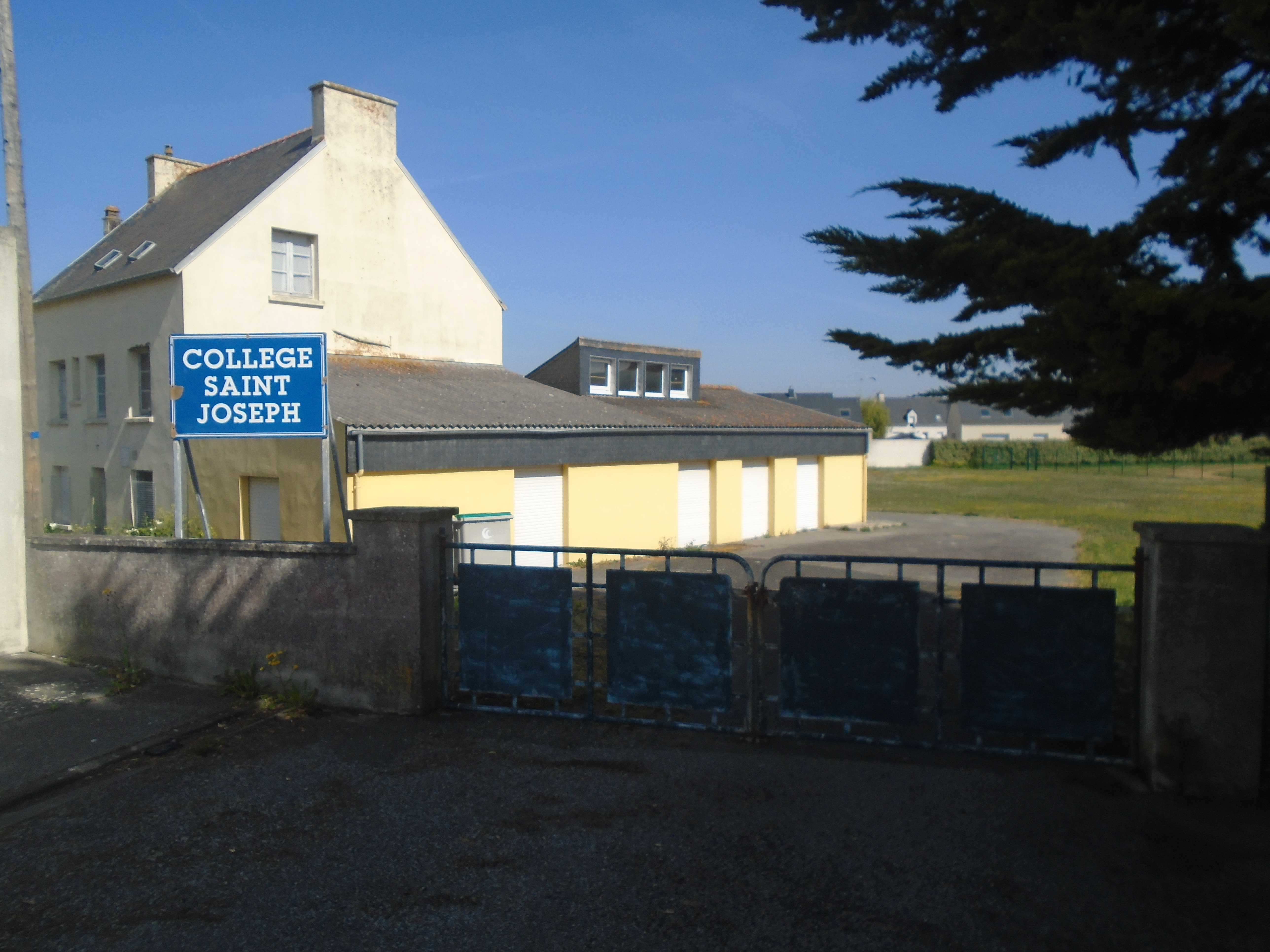 hall collège